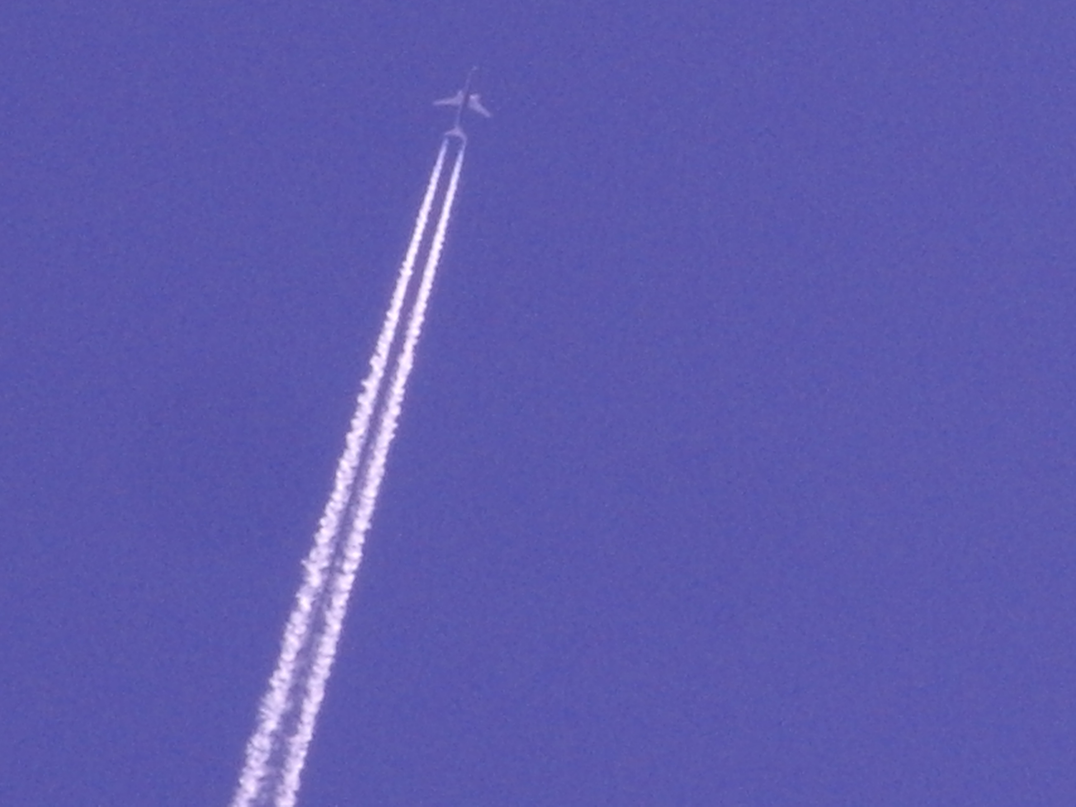 Ίχνη συμπύκνωσης φωτογραφημένα στην Ερατεινή Φωκίδος